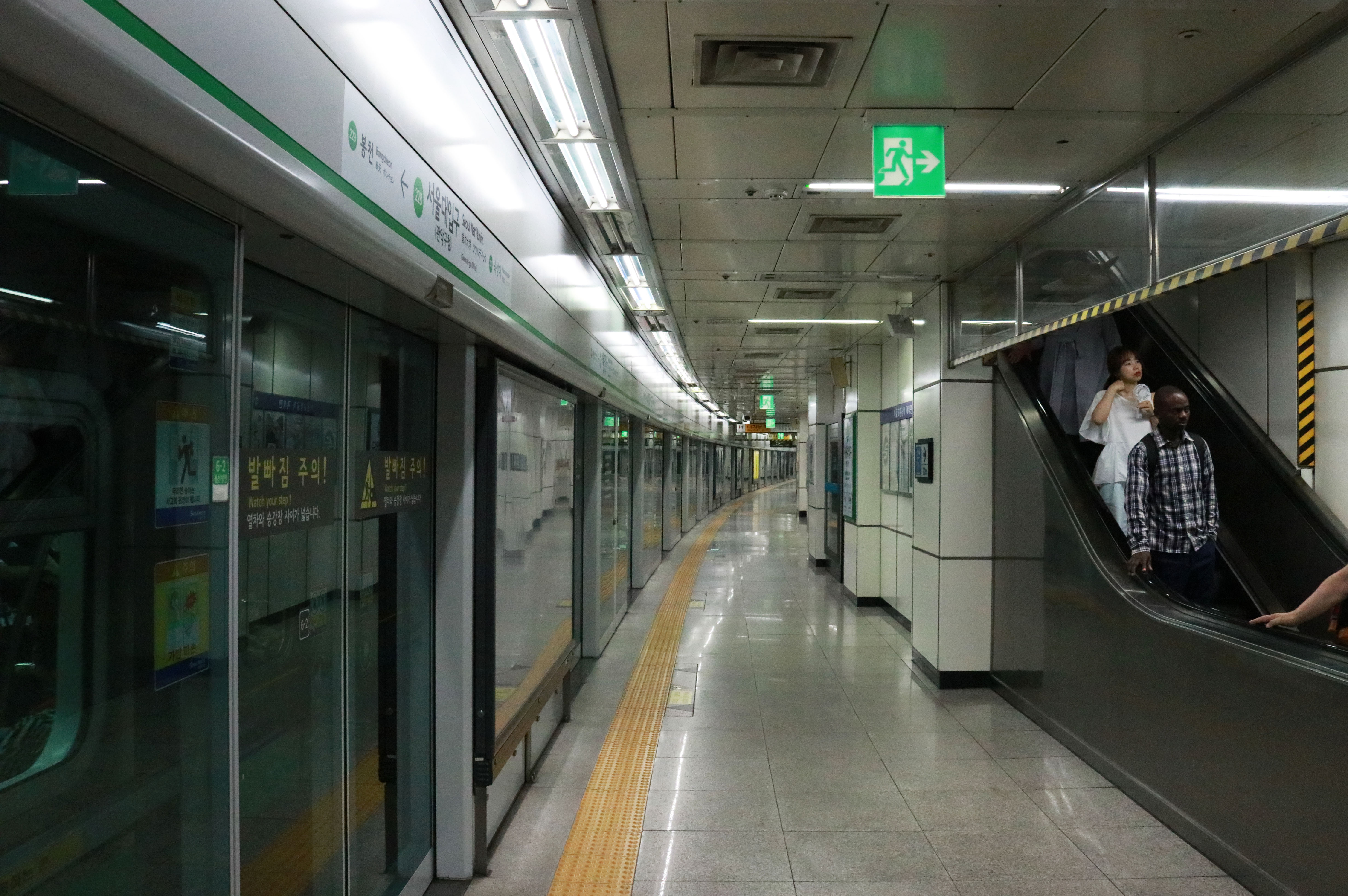 서울대입구역 승강장